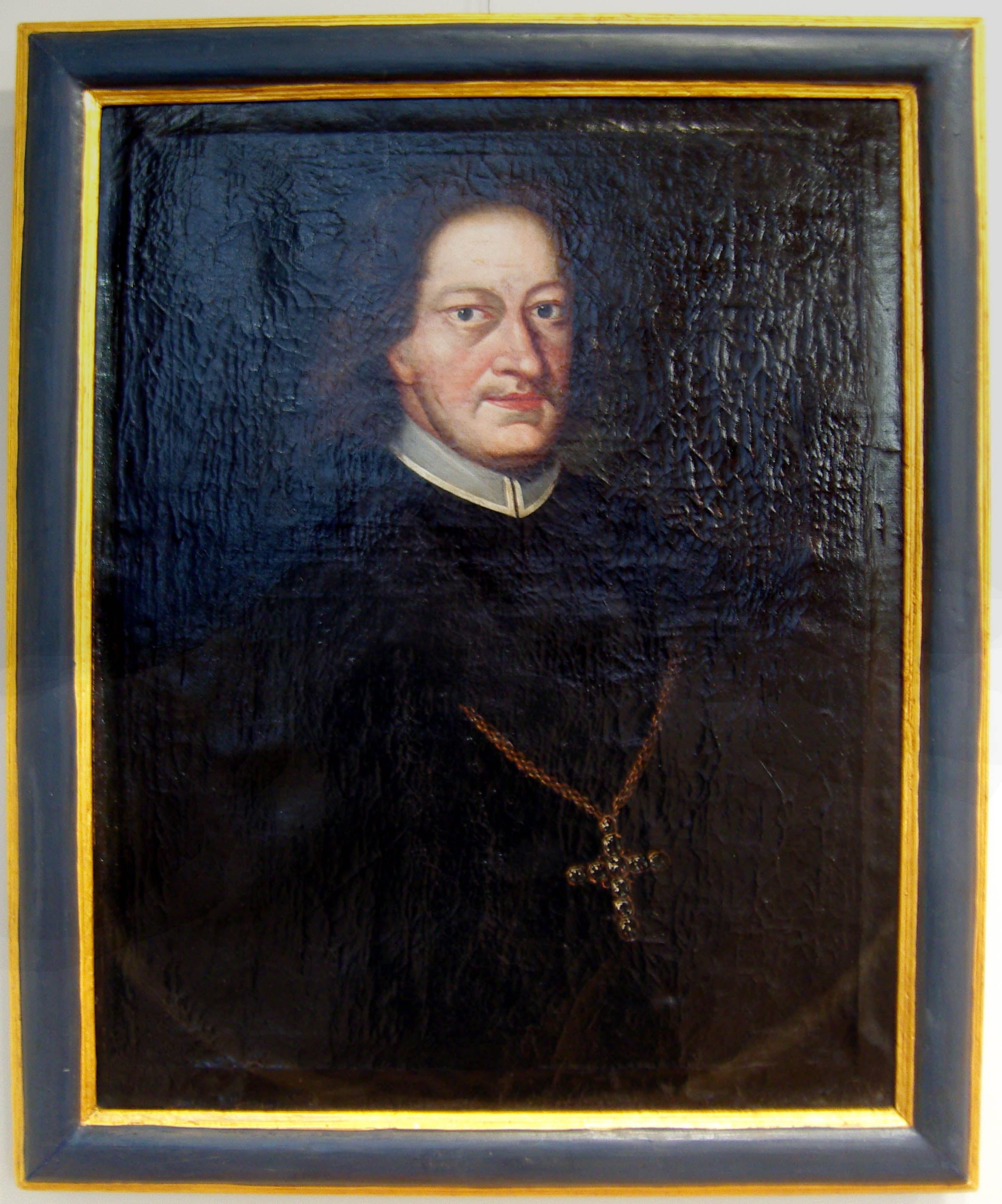 Porträt des Fuldaer Fürstabt Adalbert von Schleifras, unbekannter Maler; ausgestellt im Vonderau-Museum in Fulda; Öl auf Leinwand um 1700